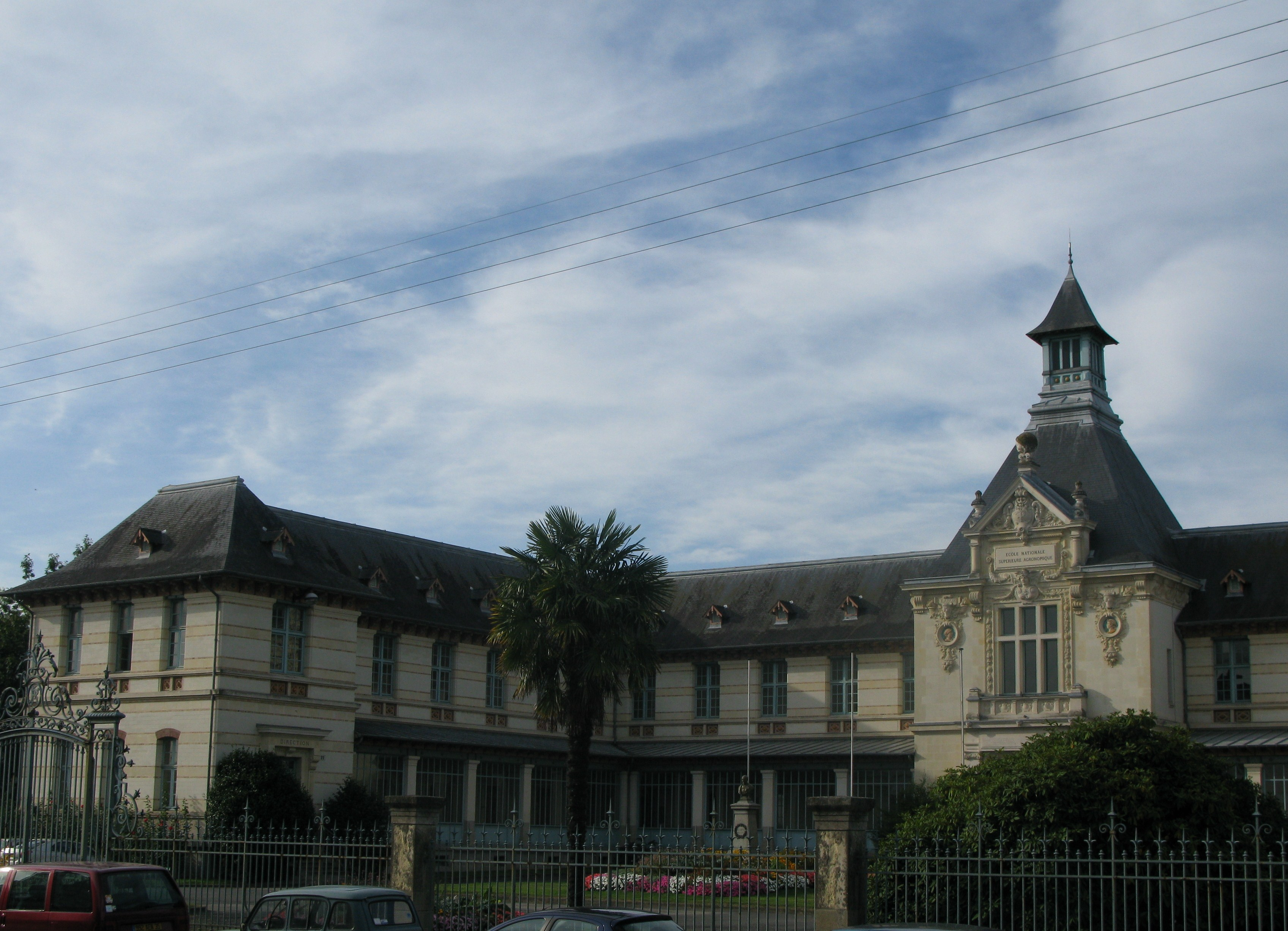 Batiment 11 de l'agrocampus ouest de Rennes.